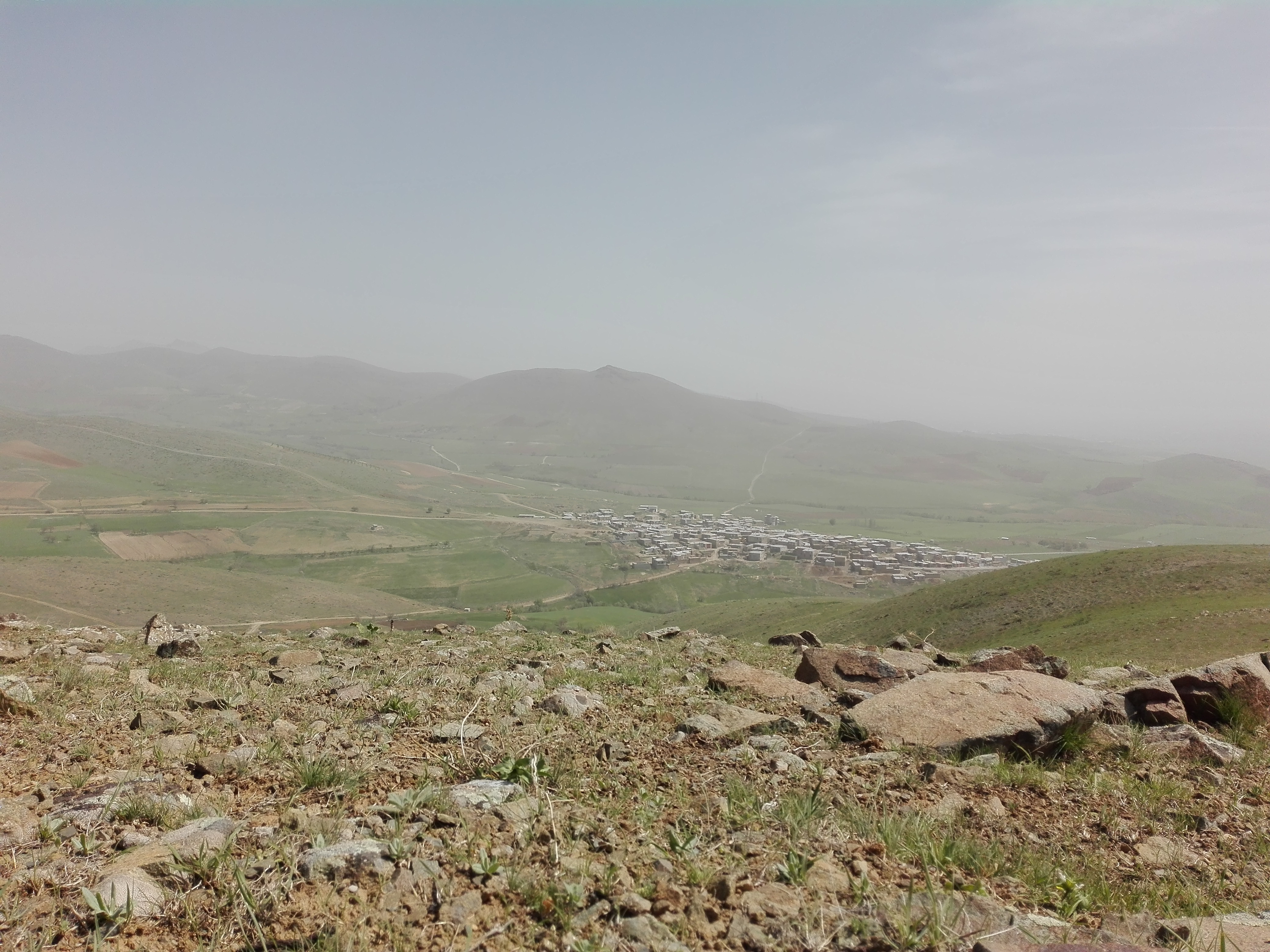 روستای آیچی از نمای دور